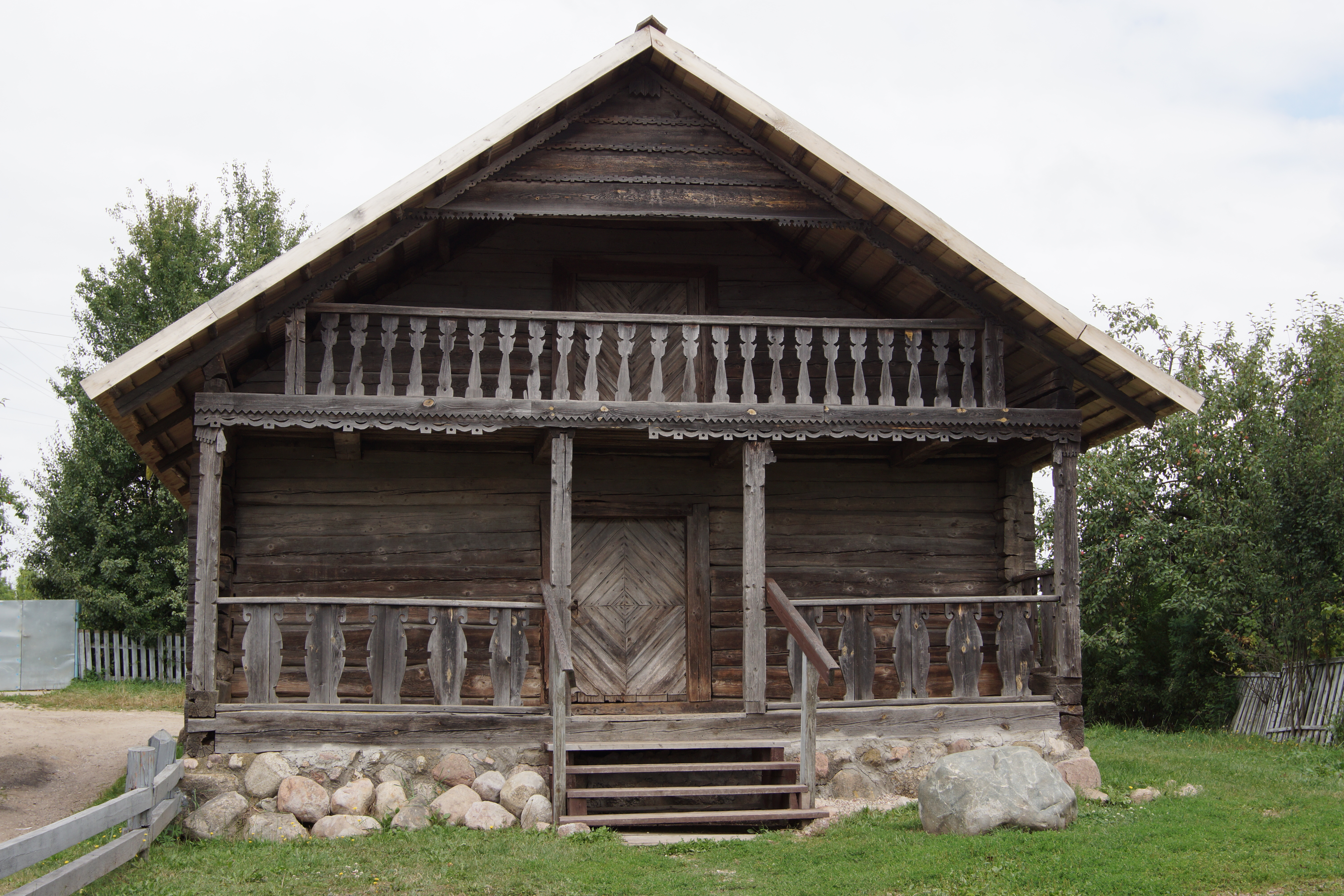 Беларуская (тарашкевіца): Музэефікаваныя аб’екты этнаграфічных комплексаў «Млын» і «Кузьня»:паравы млын дом завозьнікаў сьвіранкузьня. г. Заслаўе This is a photo of Belarusian heritage monument. Reference number: 612Г000334 ( WLM)